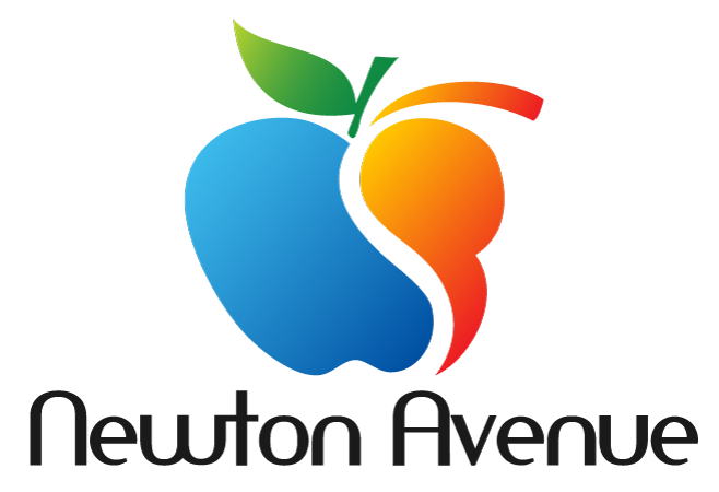 株式会社ニュートンアベニューのロゴ